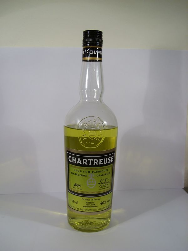 bouteille de Chartreuse jaune